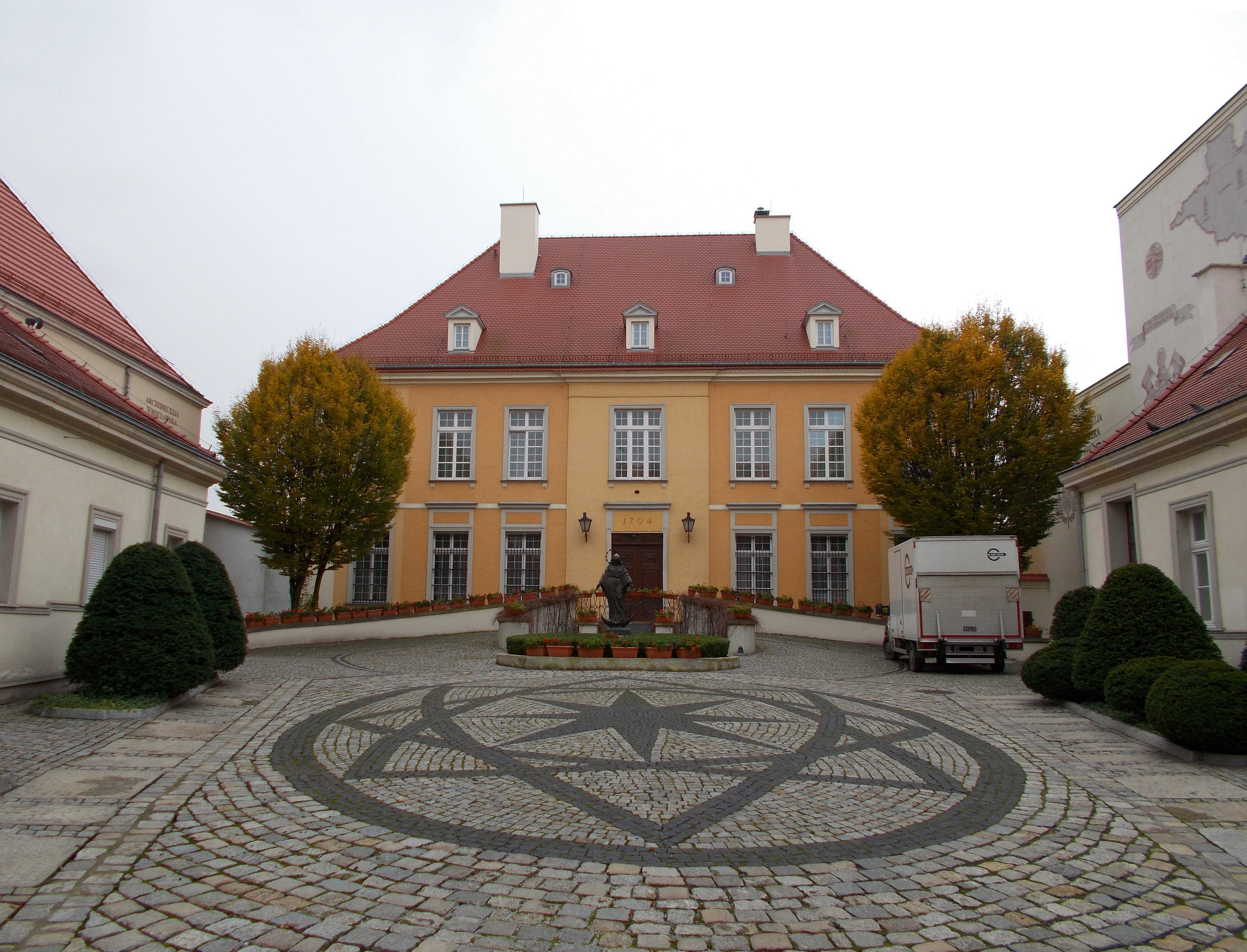 Residenz des Erzbischofs in (Breslau, Polen)